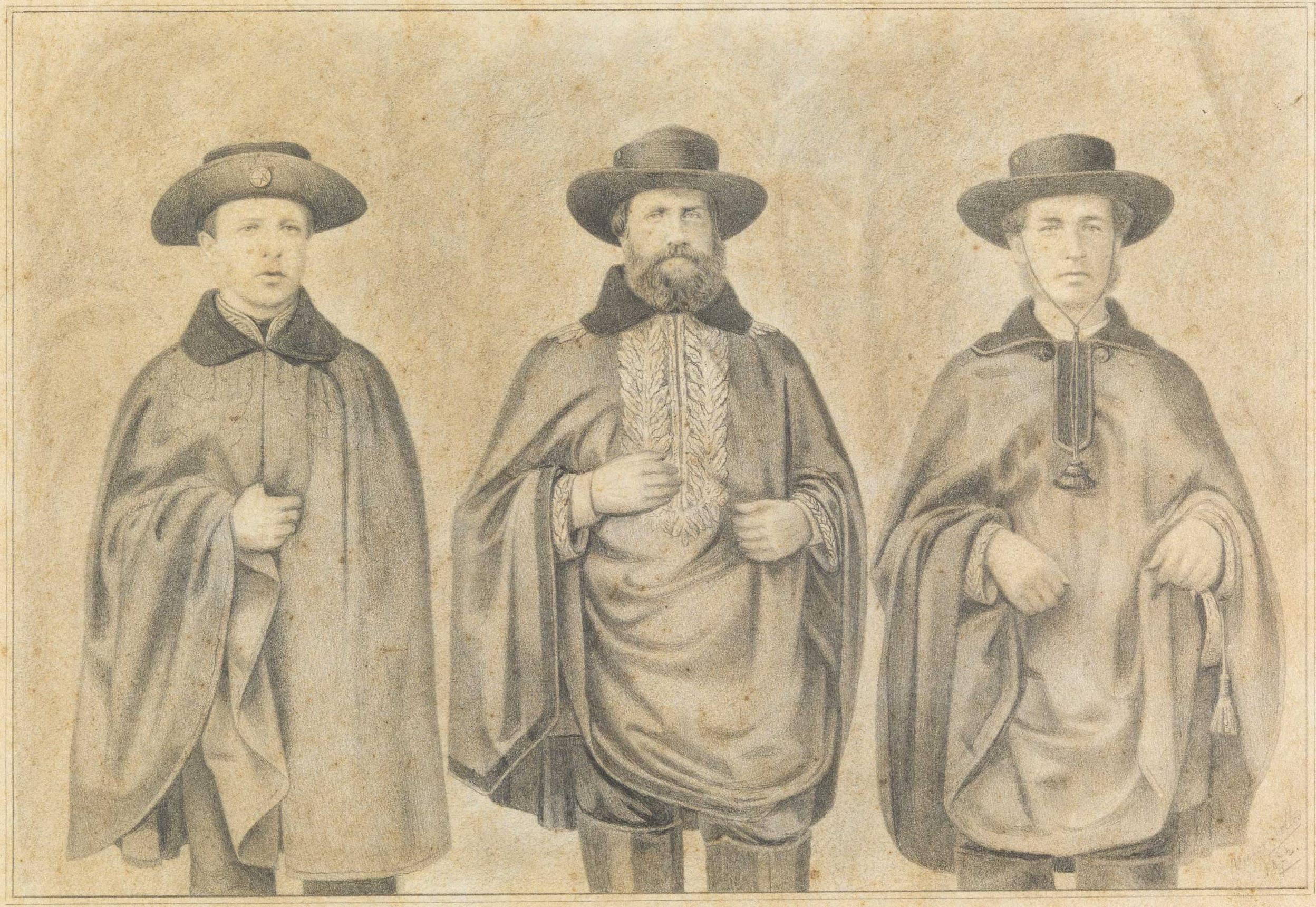 S. Magestade o Sñr. Dom Pedro II, S. Alteza o Sñr. Conde d'Eu, e S. Alteza o Sñr. Duque de Saxe quando estiveram em Uruguayana, em 1865.